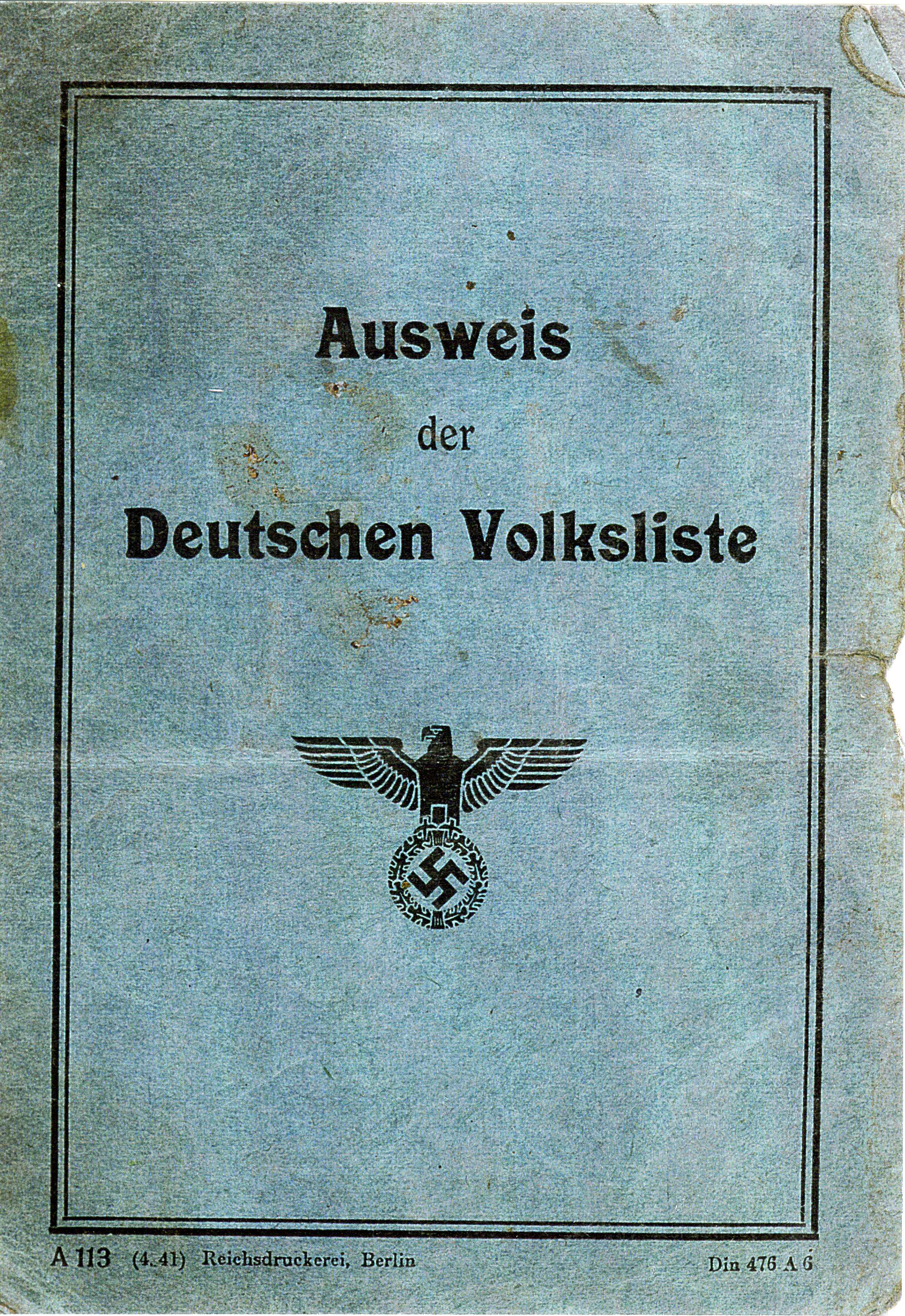 Okładka legitymacji Volkslisty (DVL). Podobnie (wraz z kartkami wewnętrznymi) wygląda legitymacja wachmanki Sydoni-Isoldy Bajer z 1941, która znajduje się w zbiorach Muzeum Tradycji Niepodległościowych w Łodzi, sygn. A-8550.